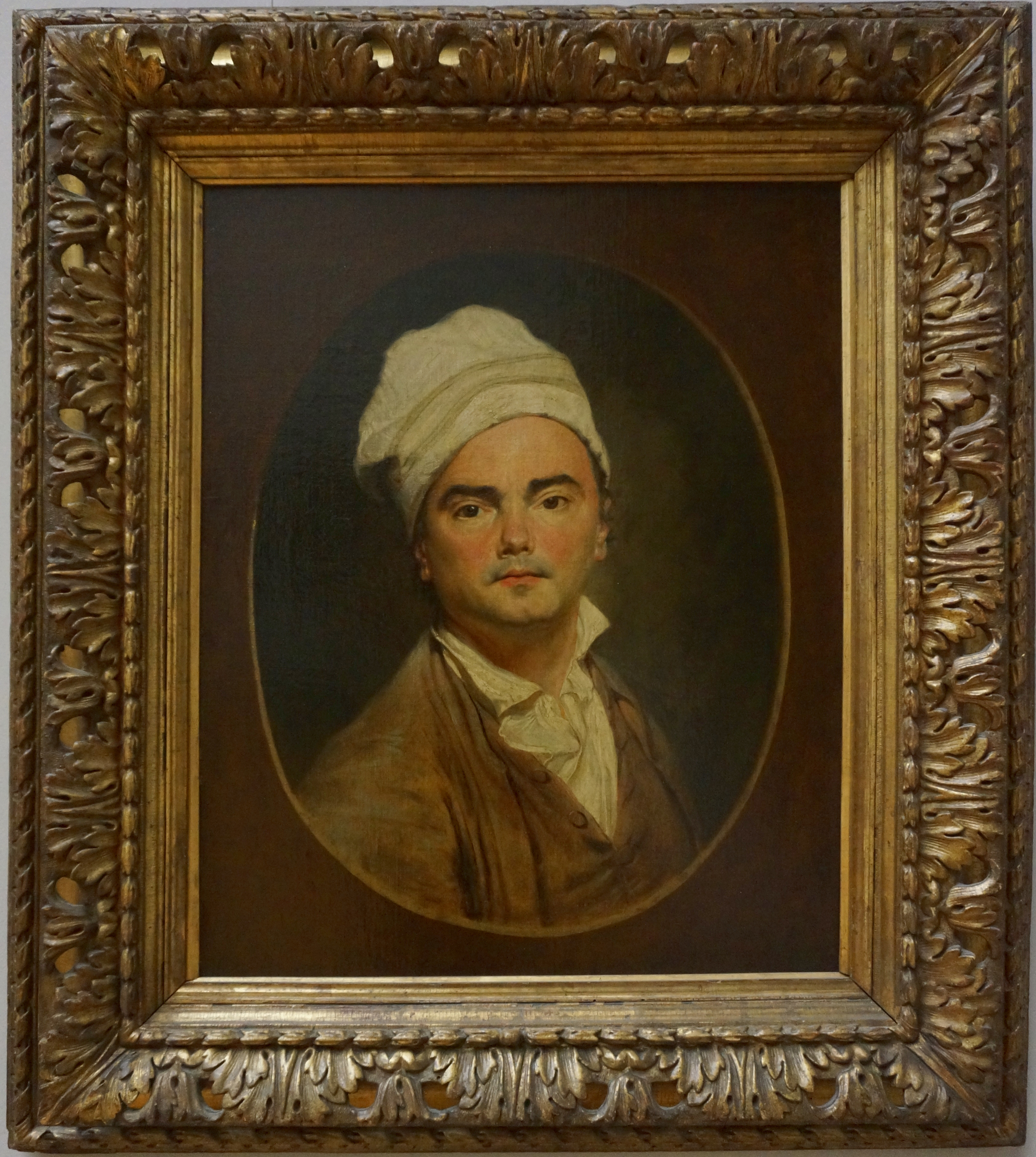 salle de la peinture française N°51.